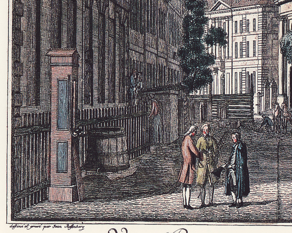 Blick in die Klosterstraße mit der Parochialkirche, Alt-Berlin/Deutschland